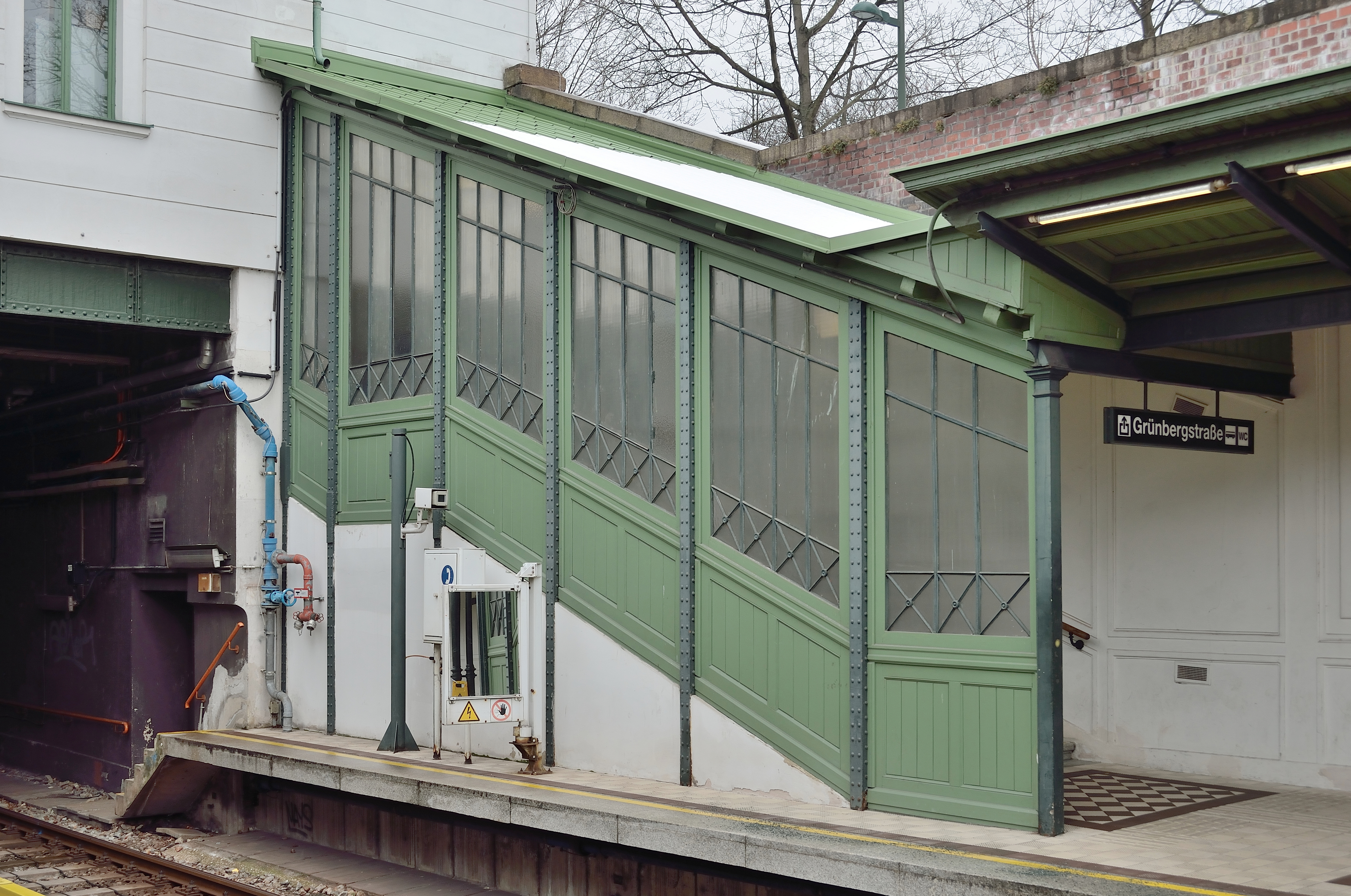 Der Aufgang / Abgang zur U4 Station Schönbrunn auf der Hietzinger (stadteinwärtigen) Seite Richtung Grünbergstraße.